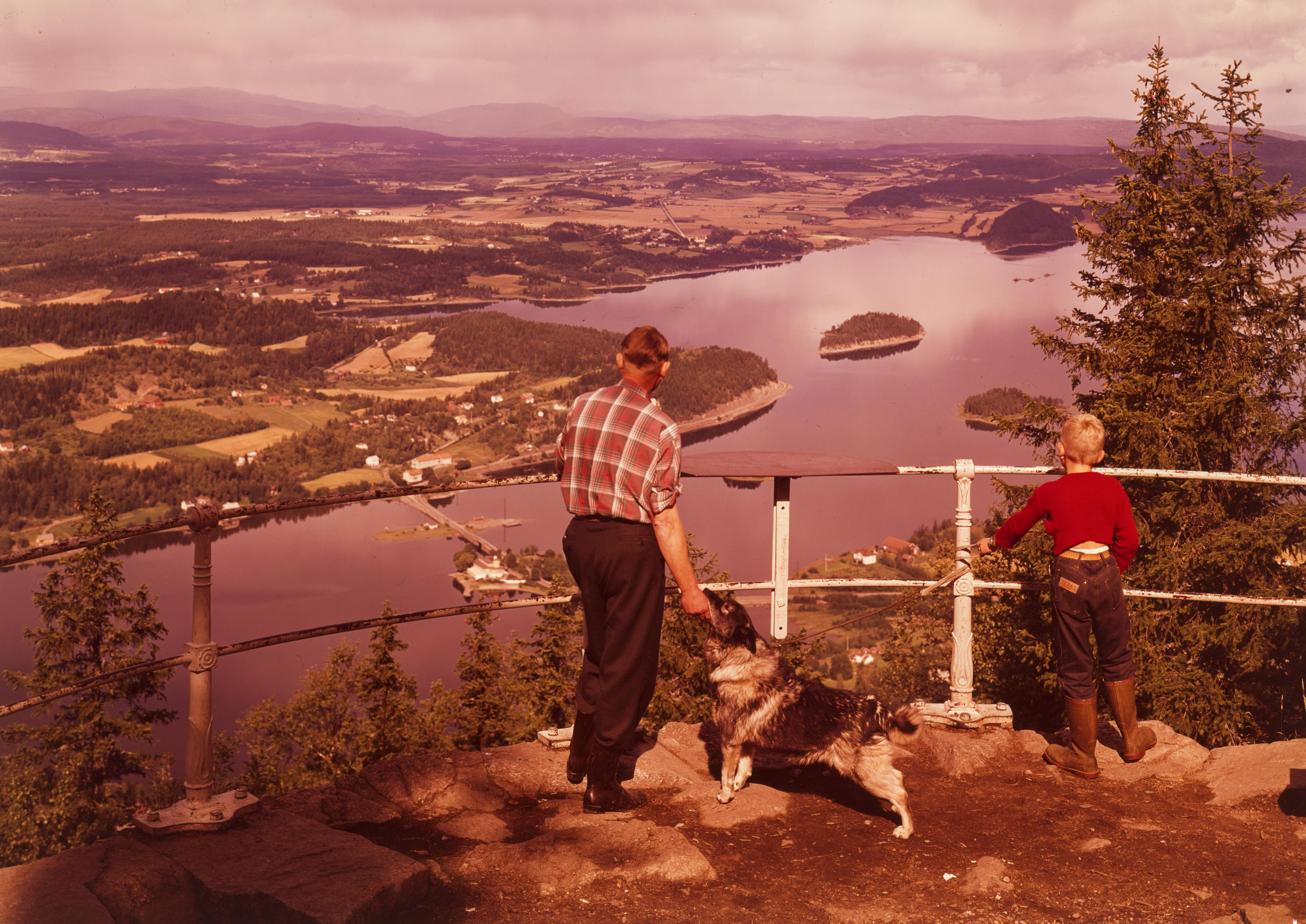 Bildet er hentet fra Nasjonalbibliotekets bildesamling. Anmerkninger til bildet var: Tittel er hentet fra emballasje. Kongens utsikt,Krokkleiva,Tyrifjorden,Steinsfjorden, Hole, Buskerud